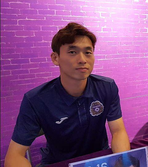 FC 안양의 주현재 사인회